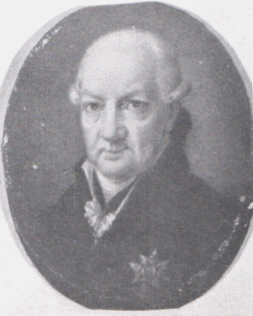 Franz Anton Freiherr von Baden (1739–1810); Präsident der vorderösterreichischen Ritterschaft